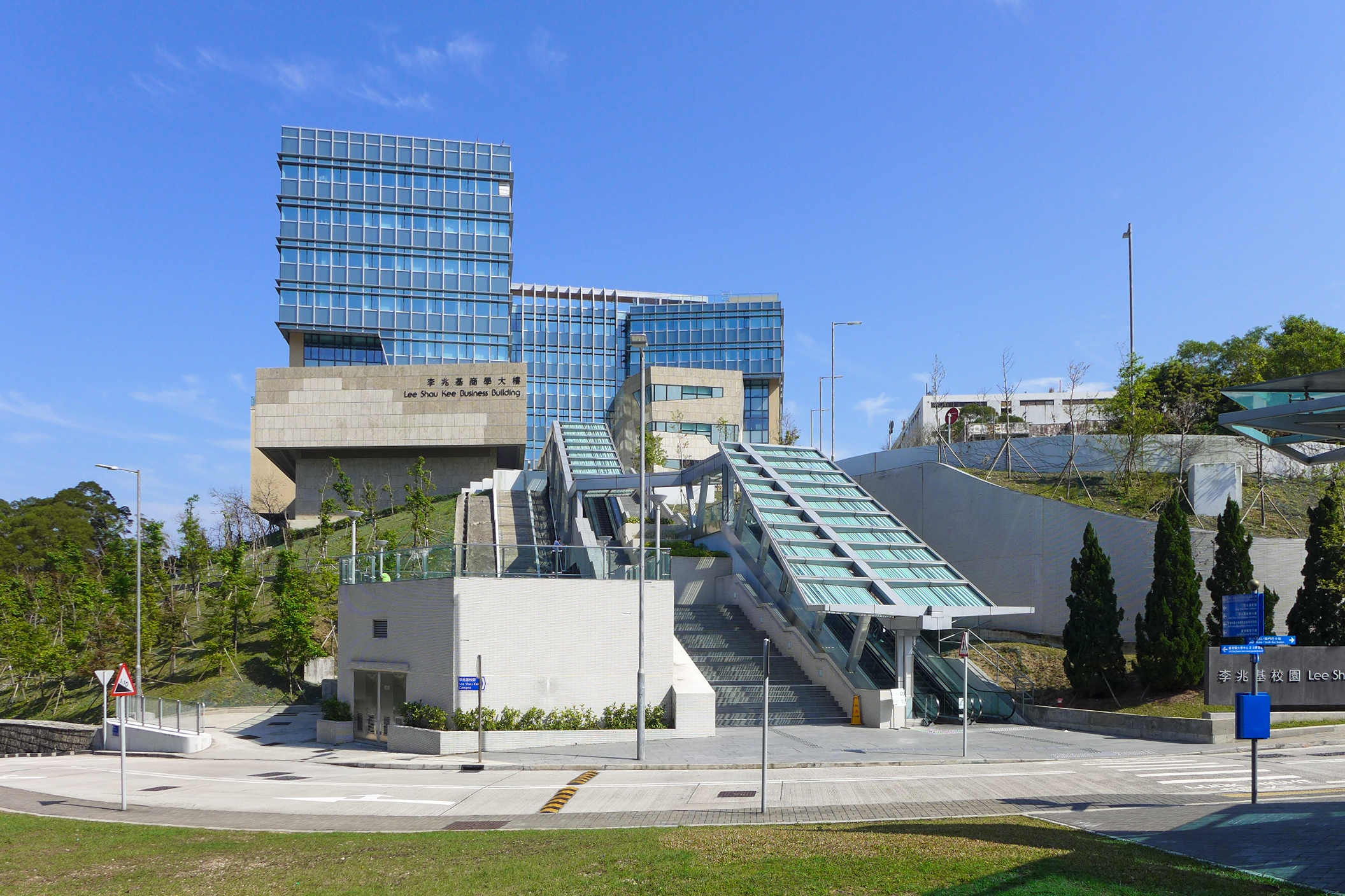 HKUST Lee Shau Kee Business Building